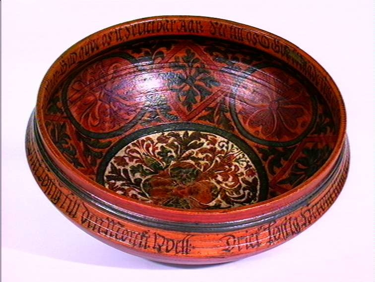 Ølbolle fra Vinje i Telemark, malt av Thomas Olsen Blix i 1713. NF.1894-0001, Norsk Folkemuseum, Oslo